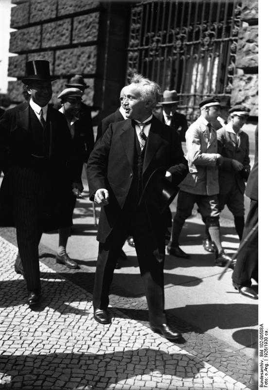 Reichsinnenminister Severing